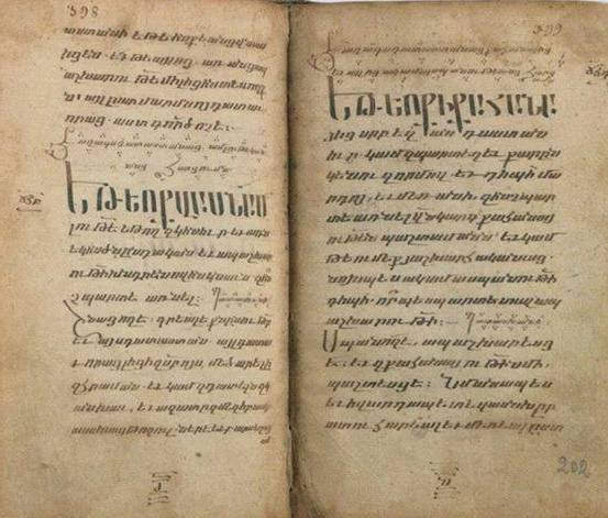 "Судебник" Гоша, авторская рукопись, 1184 год